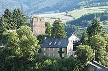 Die Burganlage mit dem Dorfgemeinschaftshaus der Ortgemeinde Dasburg. Foto: Thomas Heiles (Benutzer: Theiles, eigenes Foto)